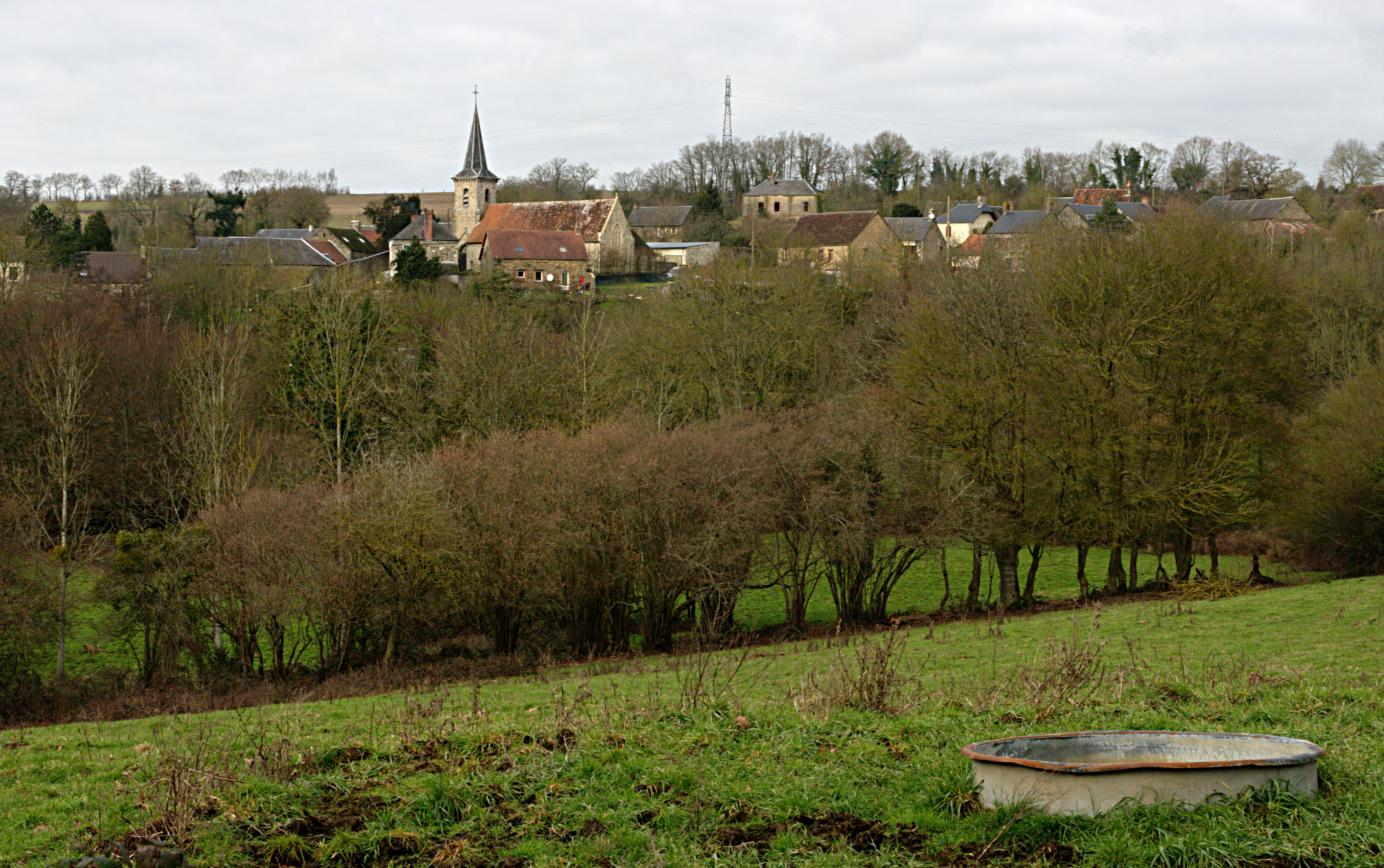 Le village de Ménil-Vin (Orne) au dessus du vallon de la rivière Baize.